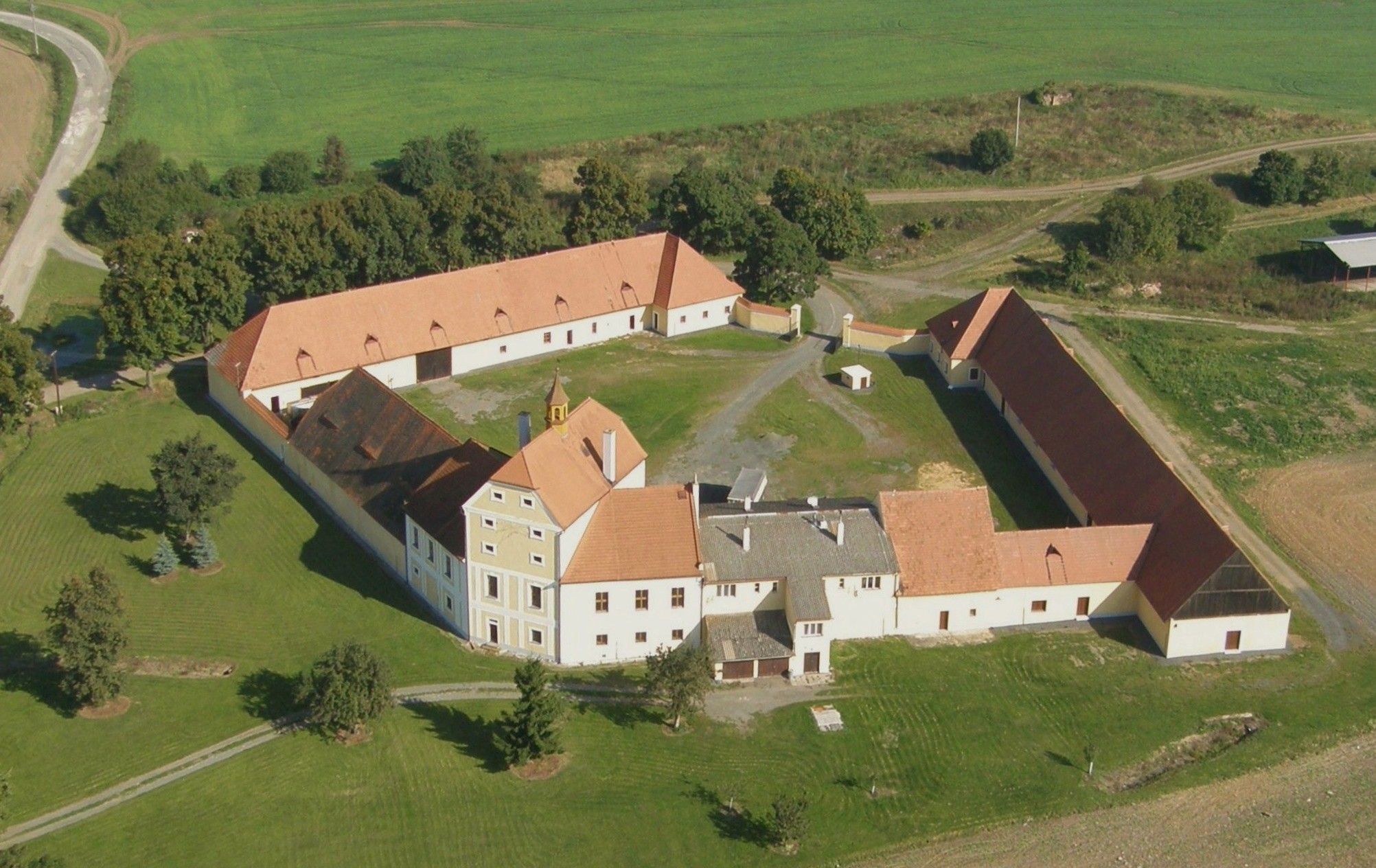 Kalec, okres Plzeň-sever, pohled z nebe 5